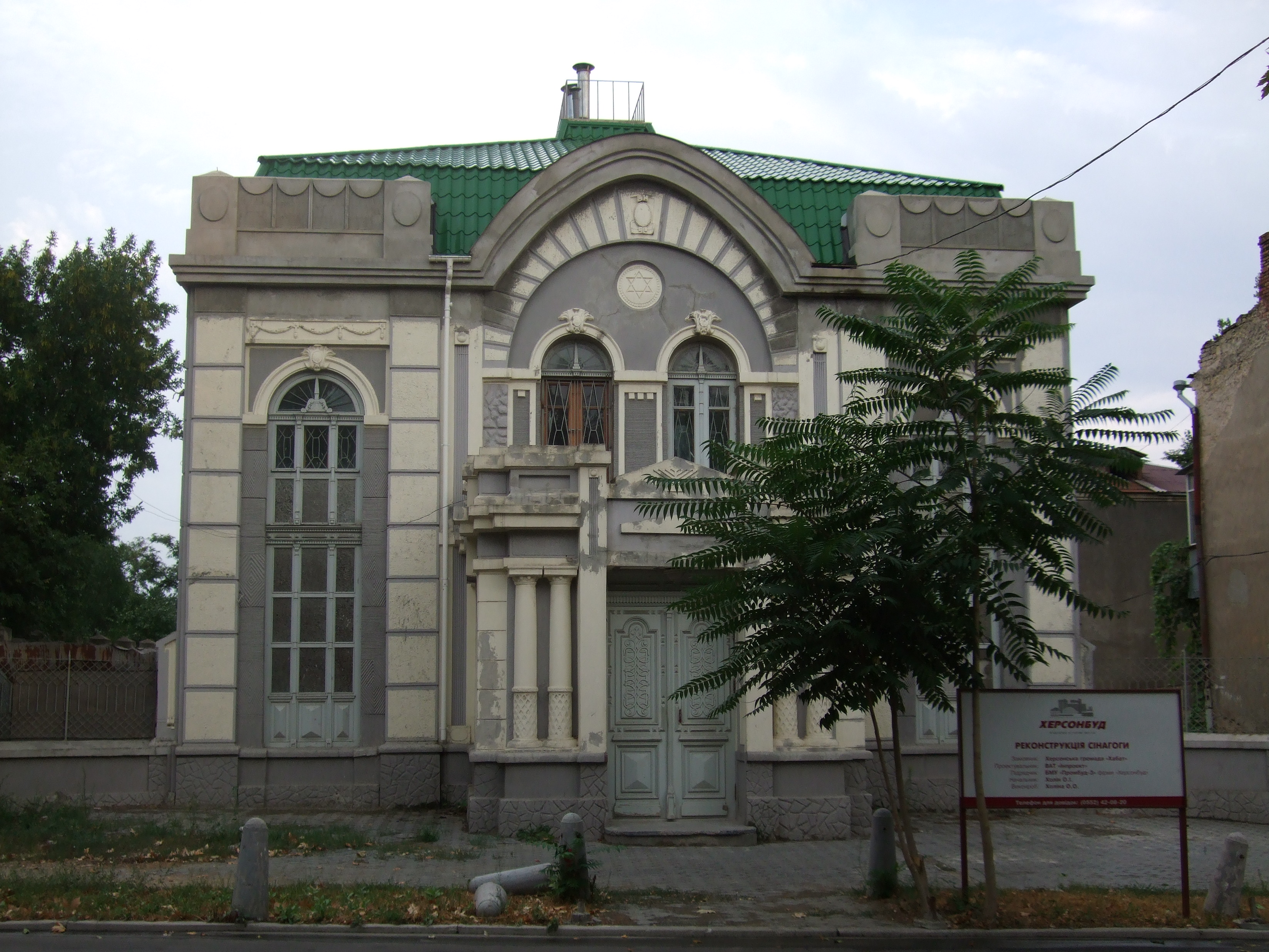 Будинок міської синагоги у м. Херсон (Херсонська область)